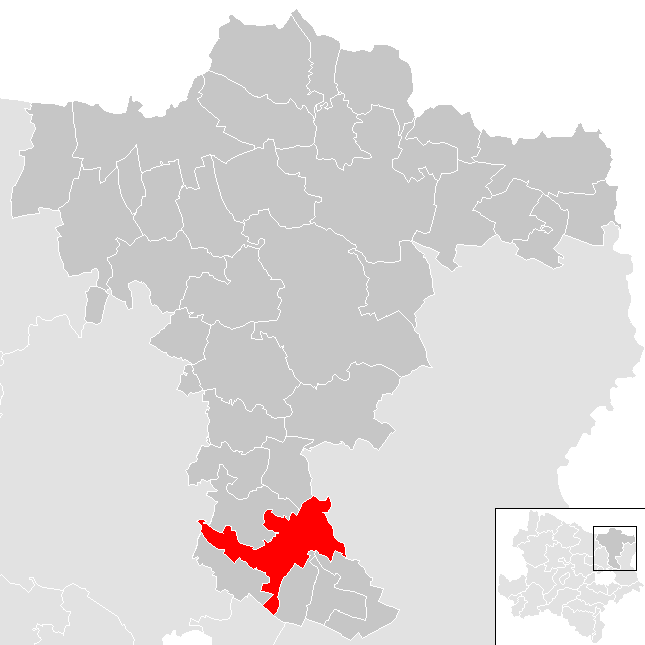 Bezirk Mistelbach